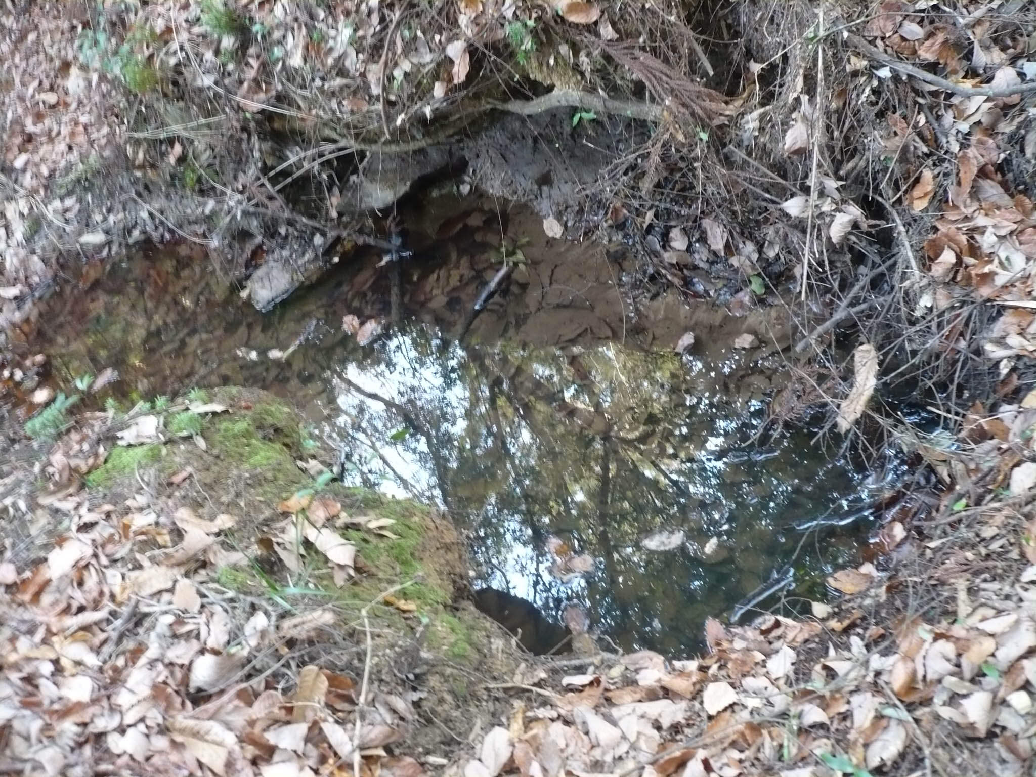 貯水池跡